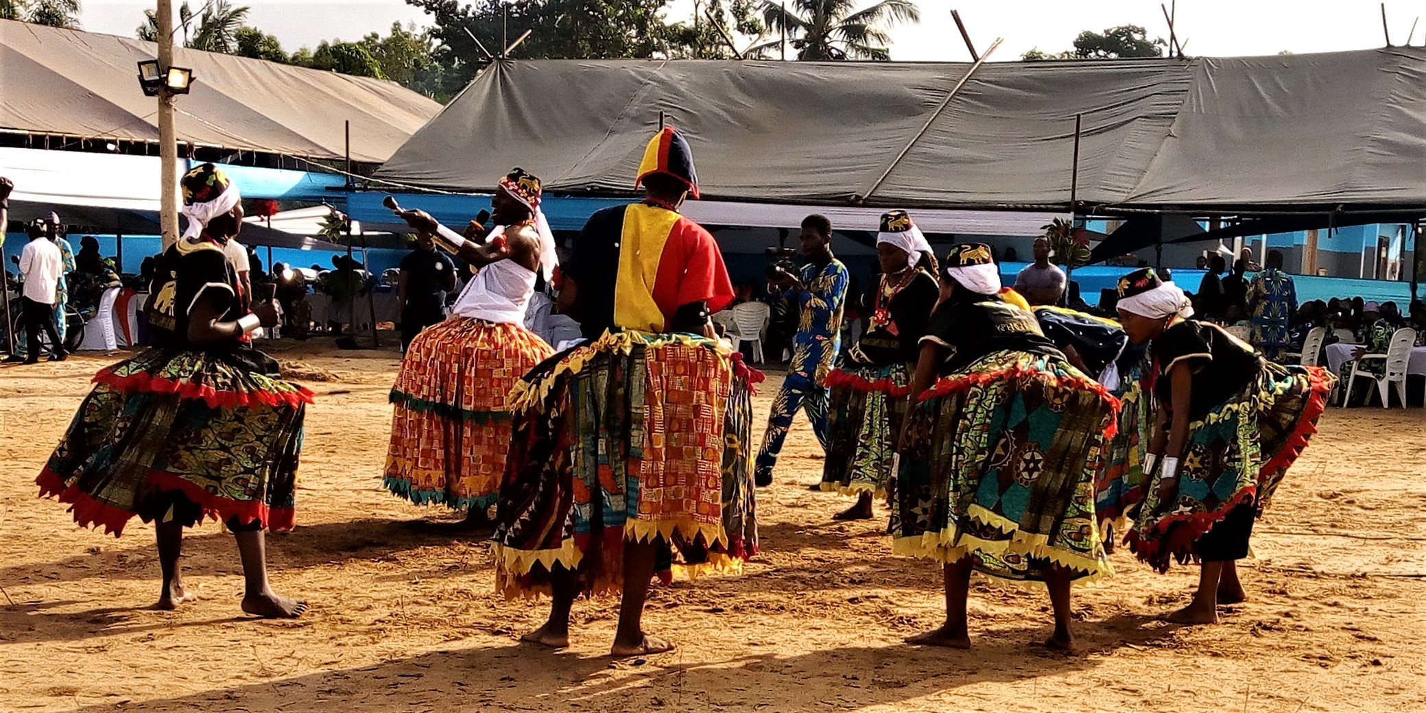 Danse du vodoun sakpata lors d'une cérémonie enterrement à comé au Bénin This photo has been taken in the country: Benin